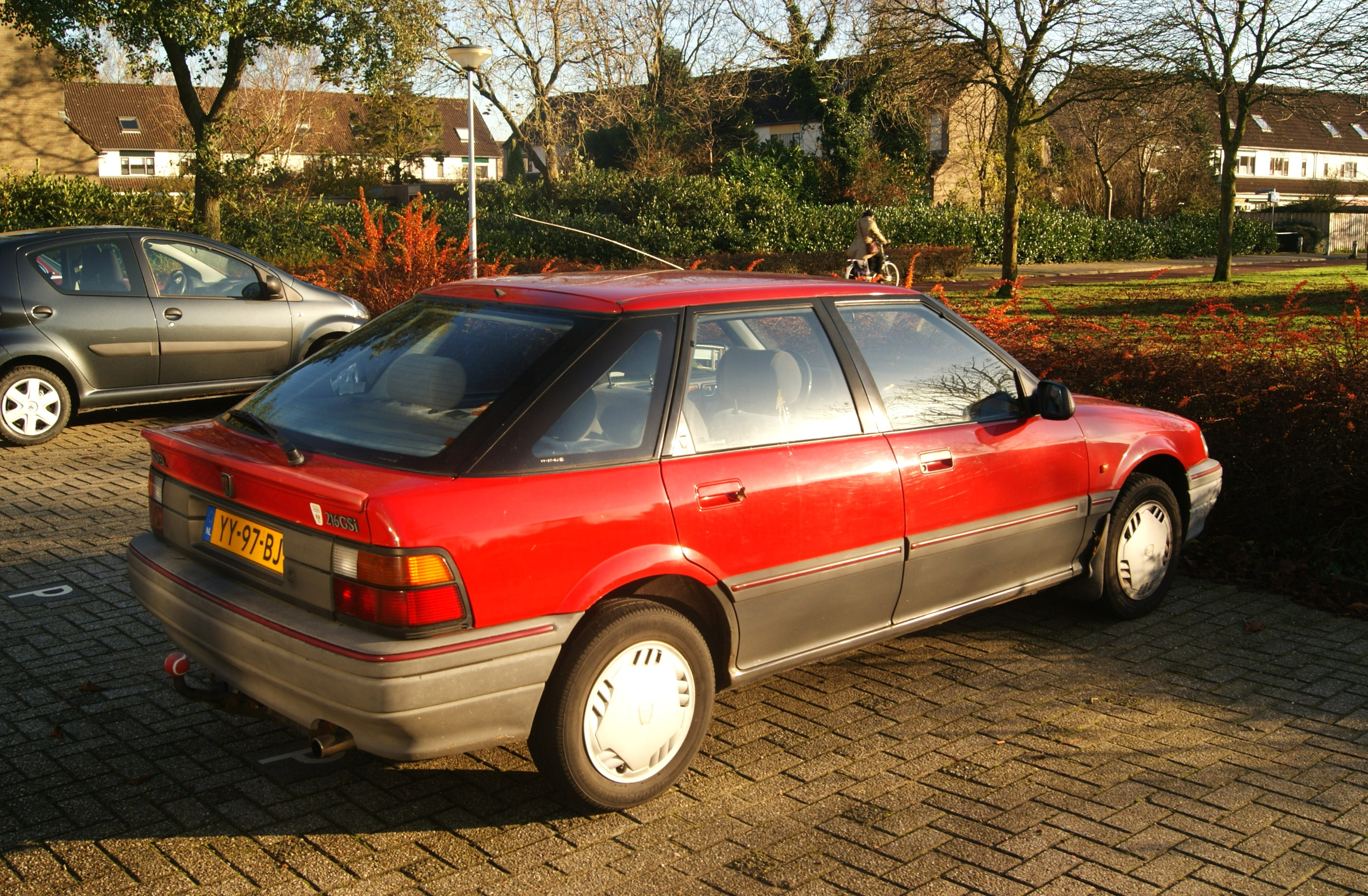 YY-97-BJ